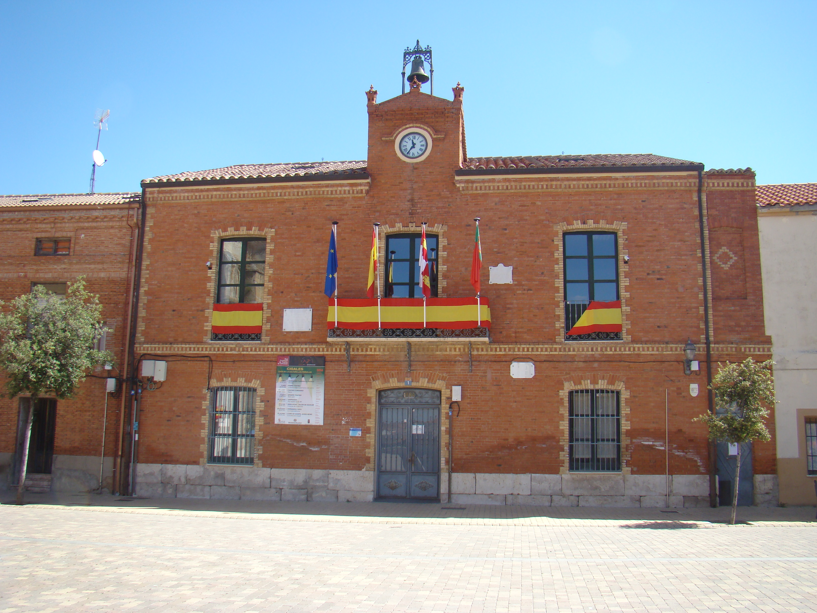 Casa Consistorial o Ayuntamiento de la ciudad de Cigales (Valladolid, España).